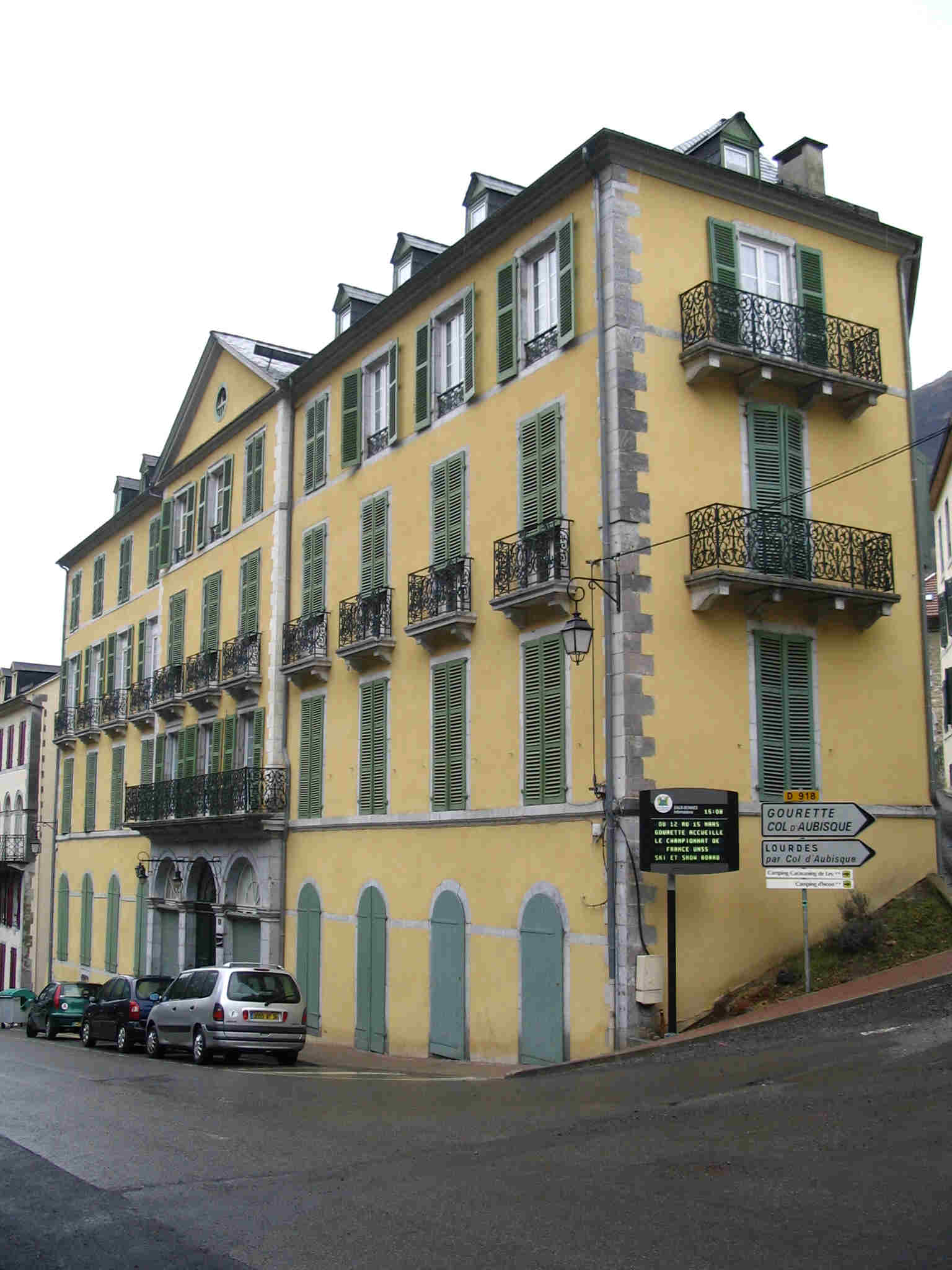 Hôtel (Anciennement Hotel Continental) aux Eaux-Bonnes, dans les Pyrénées Atlantiques (64) en France